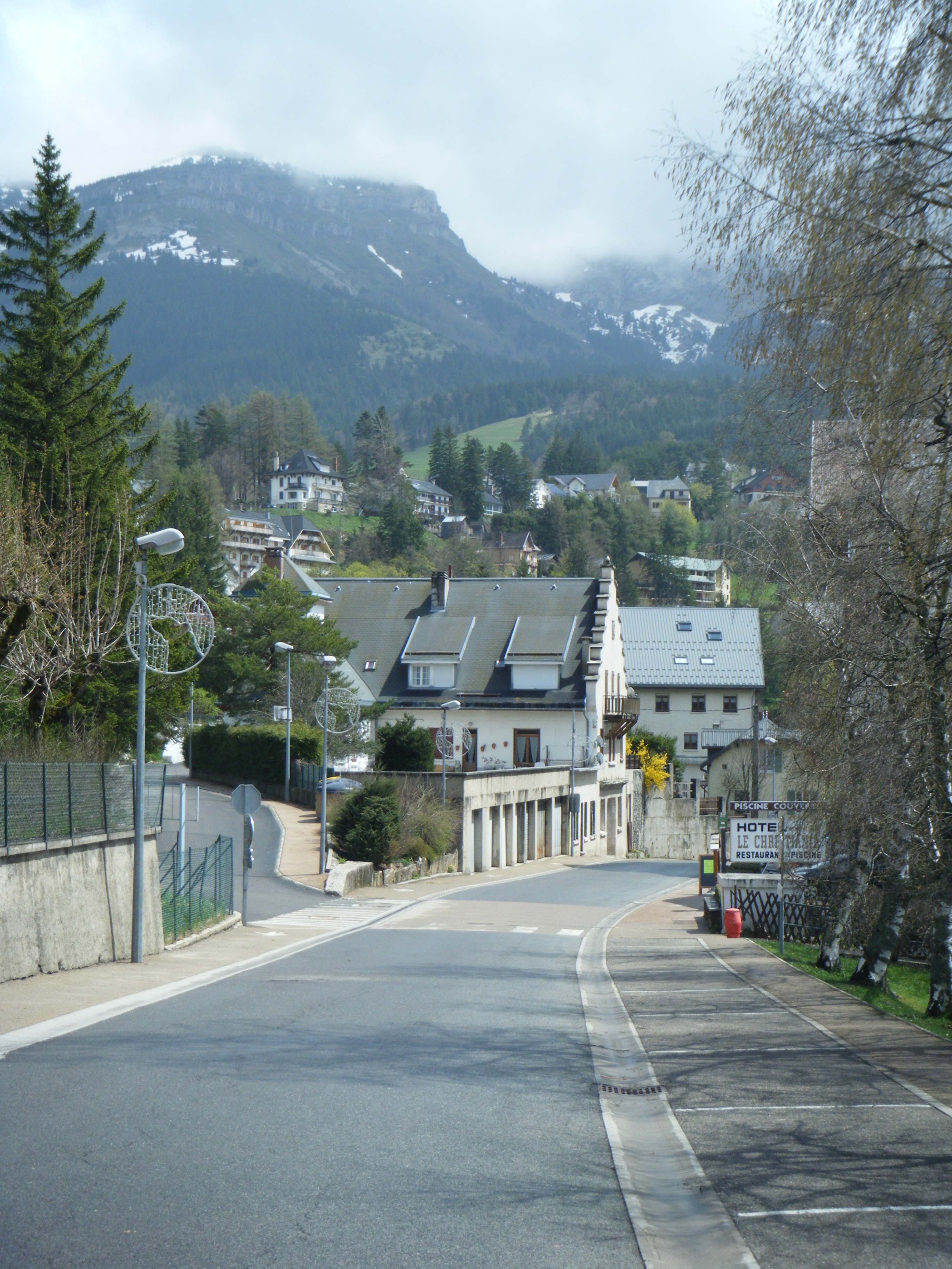 rue du Pr Nobécourt à Villard de Lans